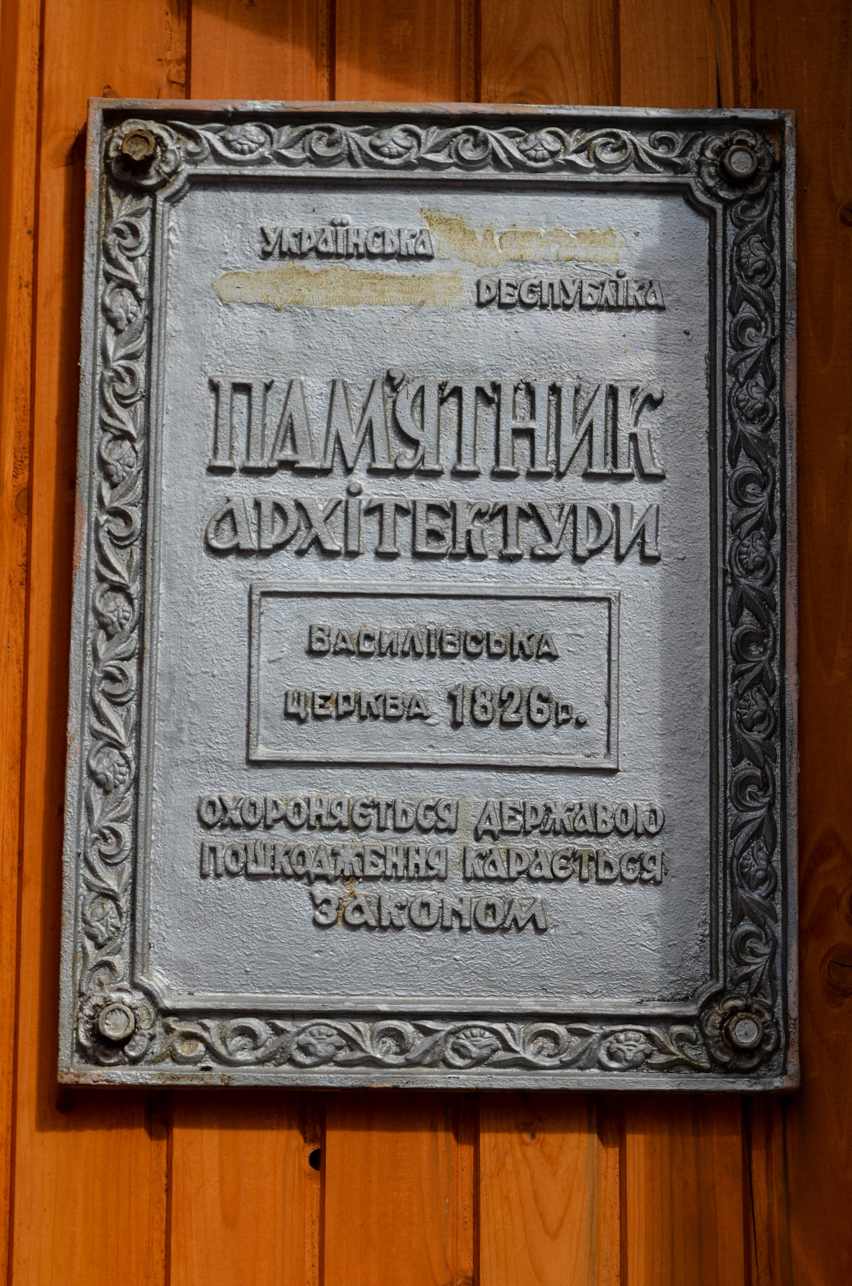 Підтвердження значущості